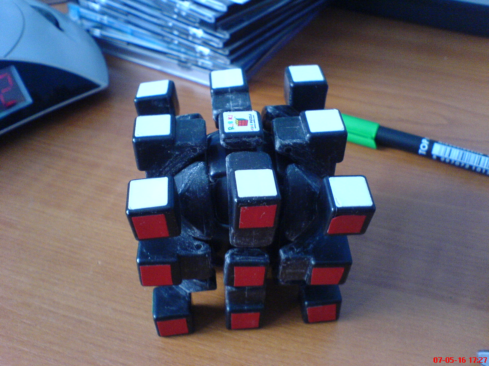 Rubik's cube - Rubik-kocka szétszedve